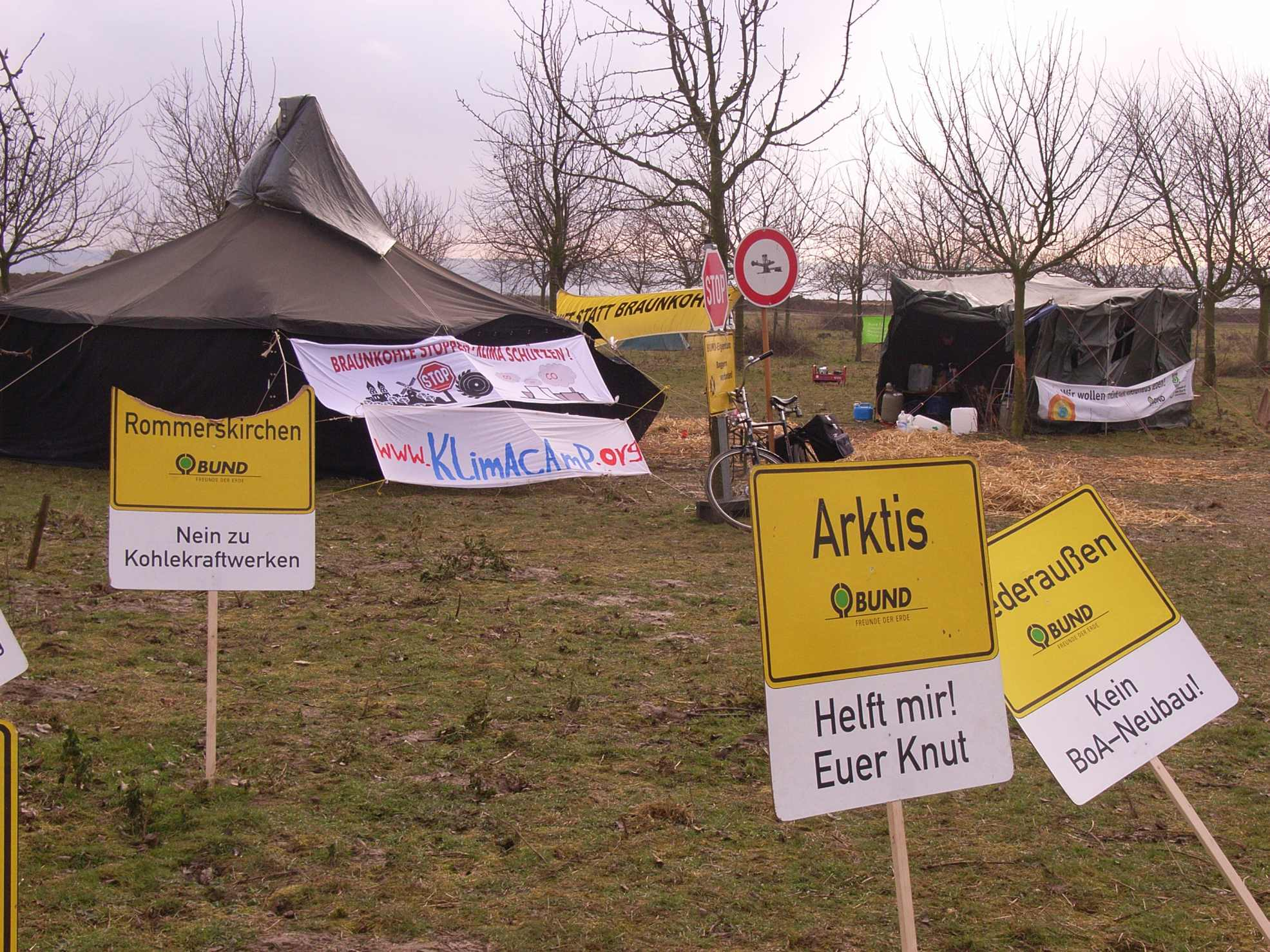 Zeltlager des BUND auf einer Obstwiese bei Otzenrath am Rand des Tagebaus Garzweiler, NRW